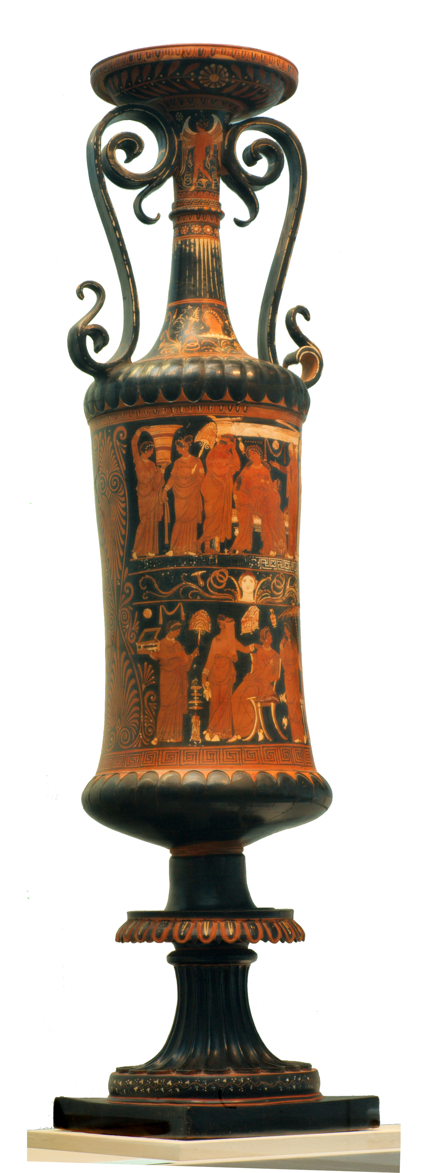 Alkestis verabschiedet sich von ihrem Gatten Admet und ihren Kindern. Apulische Loutrophoros um 340 Chr.